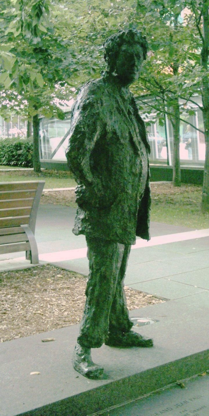 Le Grand Jean-Paul par Roseline Granet 2003 Bronze représentant Jean-Paul Riopelle Situé à l'entrée du parc Jean-Paul Riopelle à Montréal